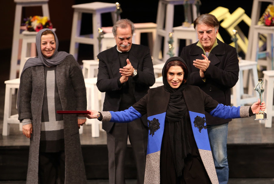 نسیم ادبی در اختتامیه سی و پنمین جشنواره تئاتر فجر